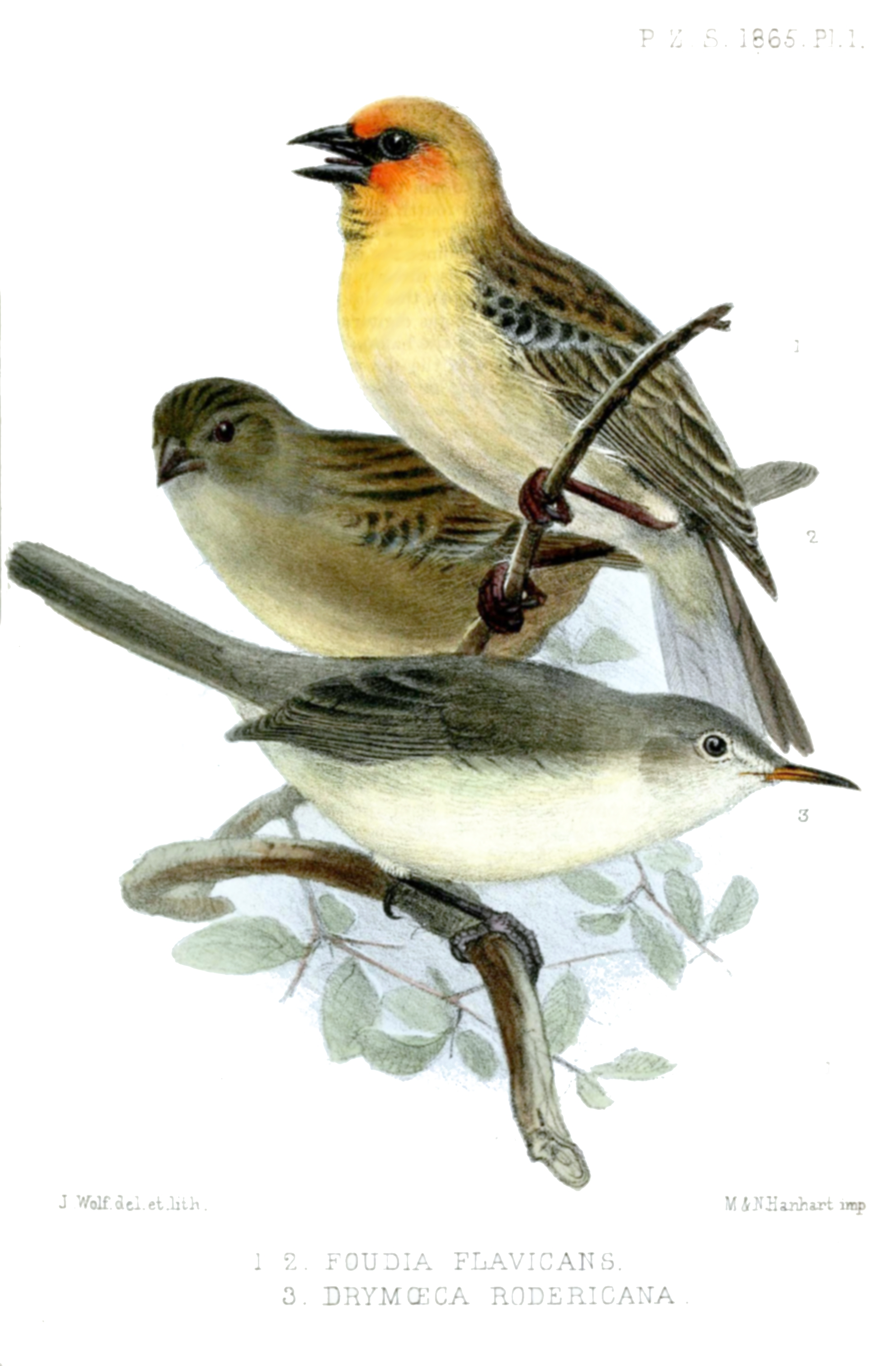 Foudia flavicans & Drymoeca rodericana ( = Acrocephalus rodericanus)